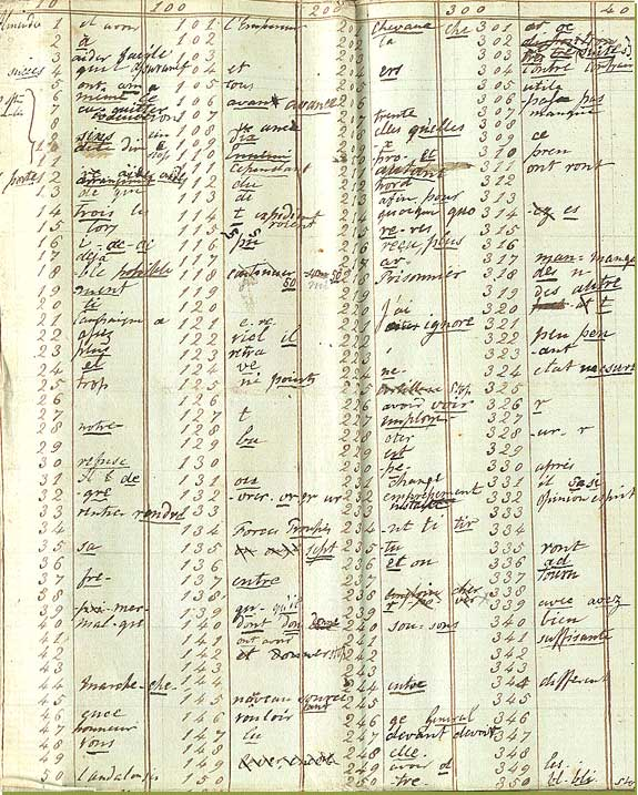 Шифроблокнот армии Наполеона за 1812 год